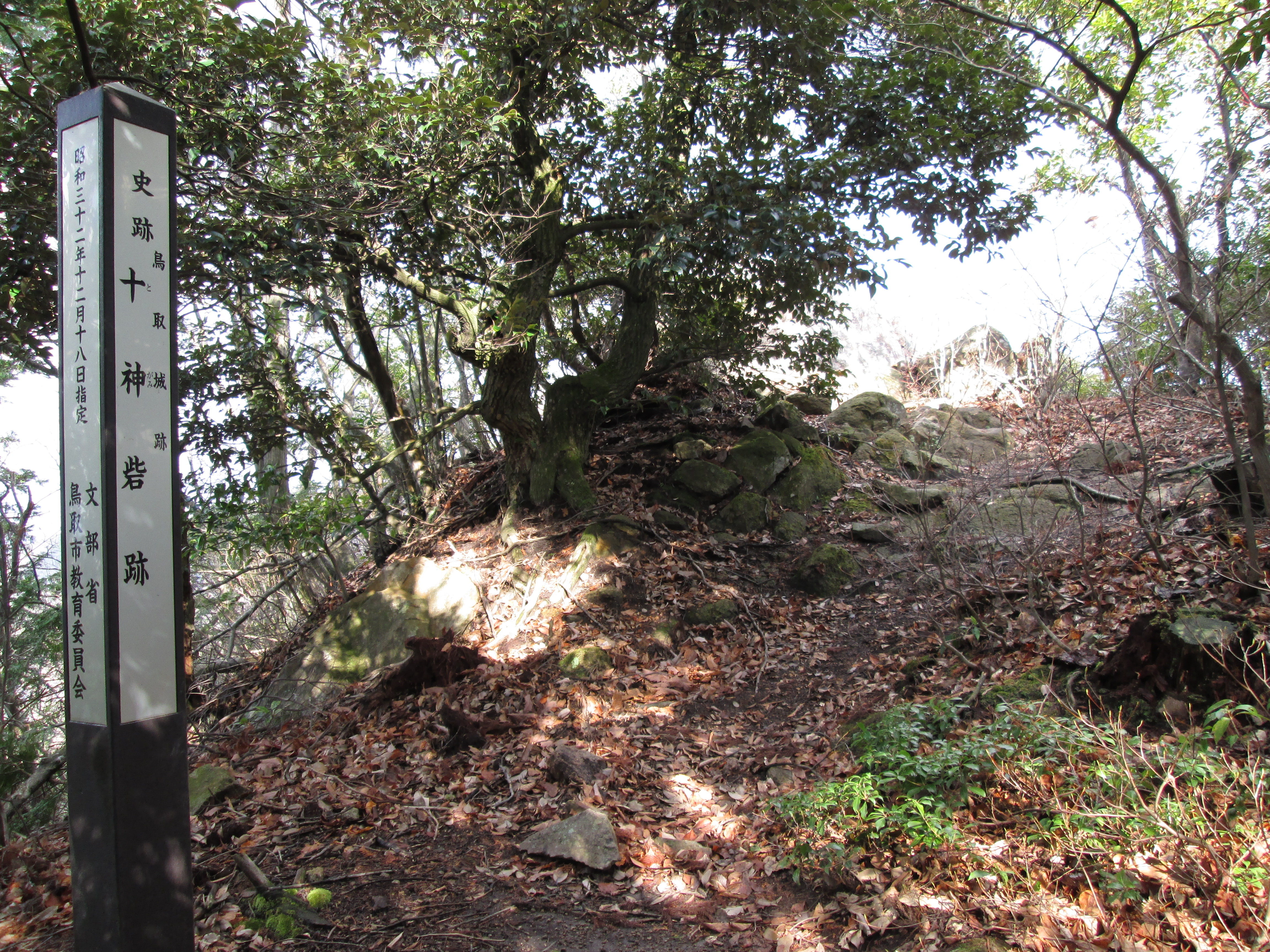 鳥取城の十神砦の跡地。